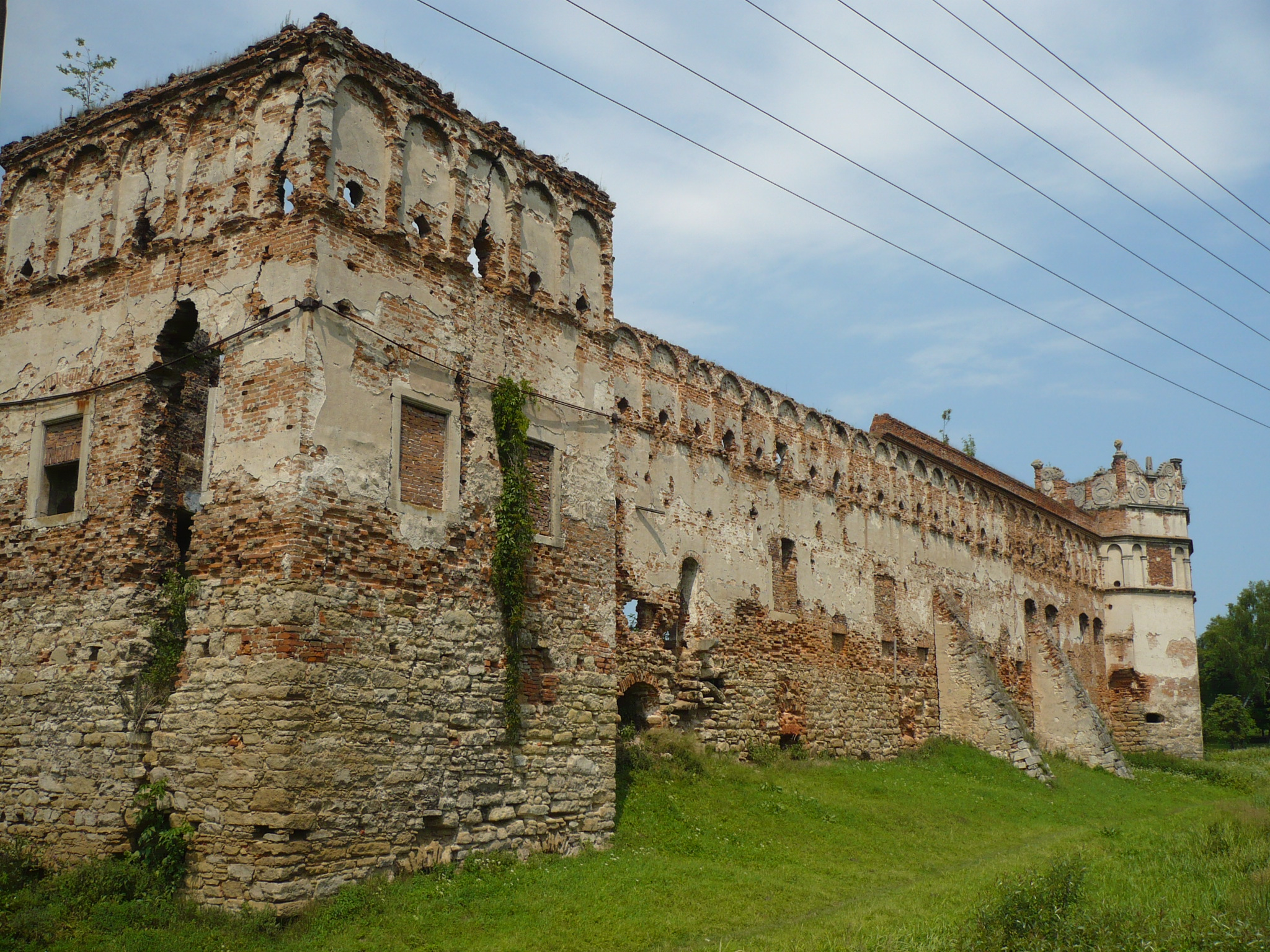 Starym Sioło - zamek księcia Zasławskiego